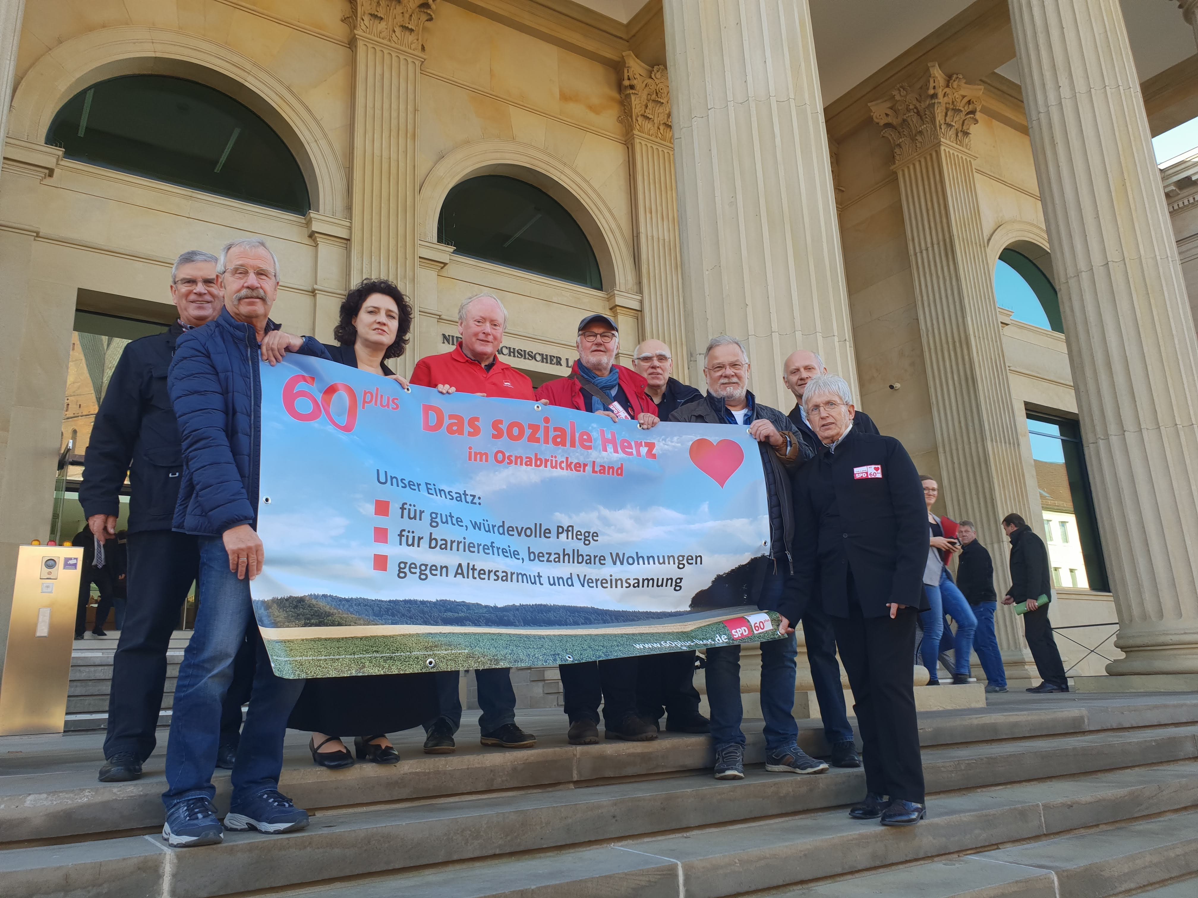 AG SPD 60plus Osnabrücker Land mit Sozialministerin Carola Reimann am 15.11.2018 am Landtag in Hannover